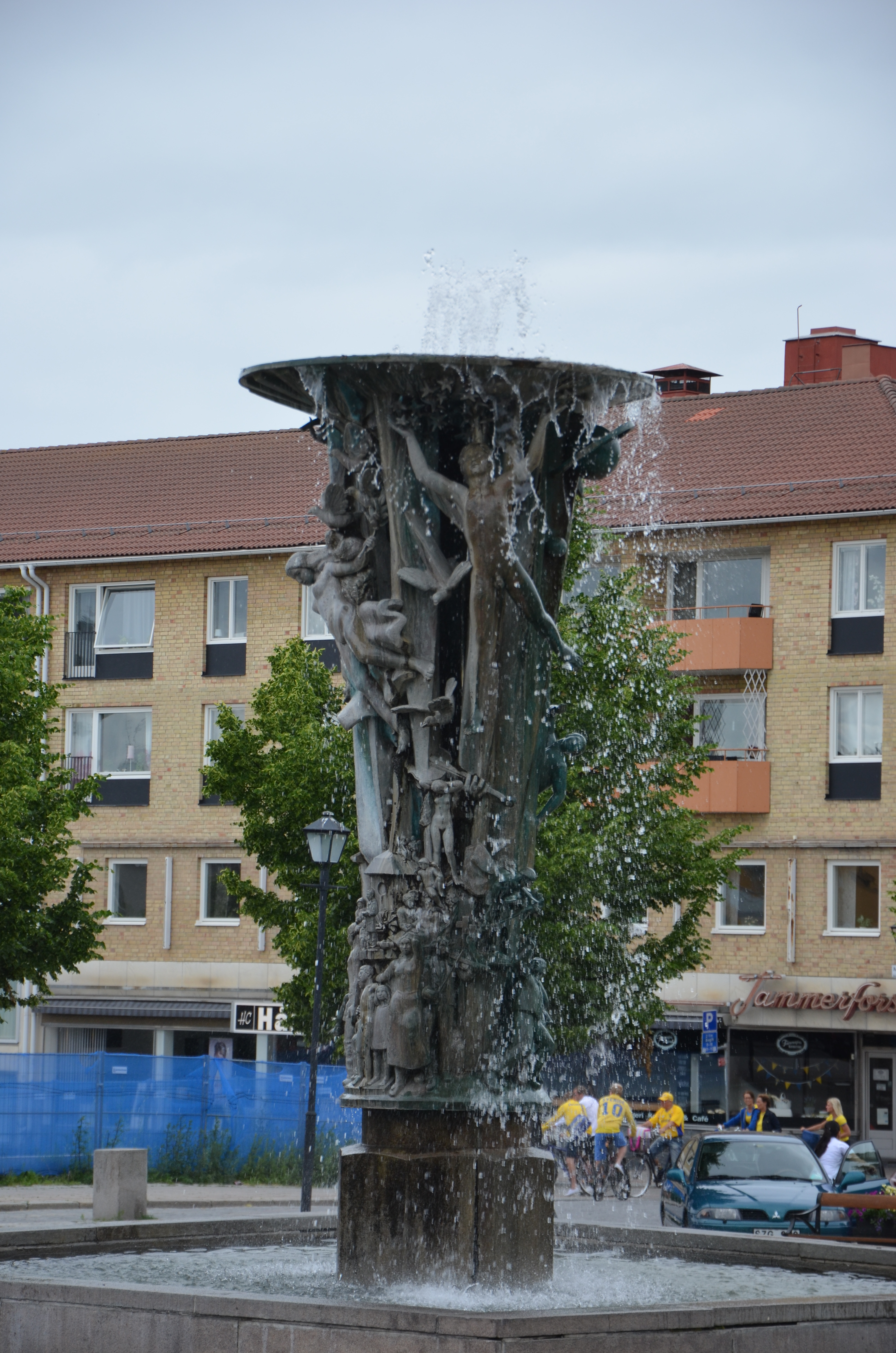 Nils Sjögren De fyra elementens brunn på Stora Torget i Enköping. Från norr.